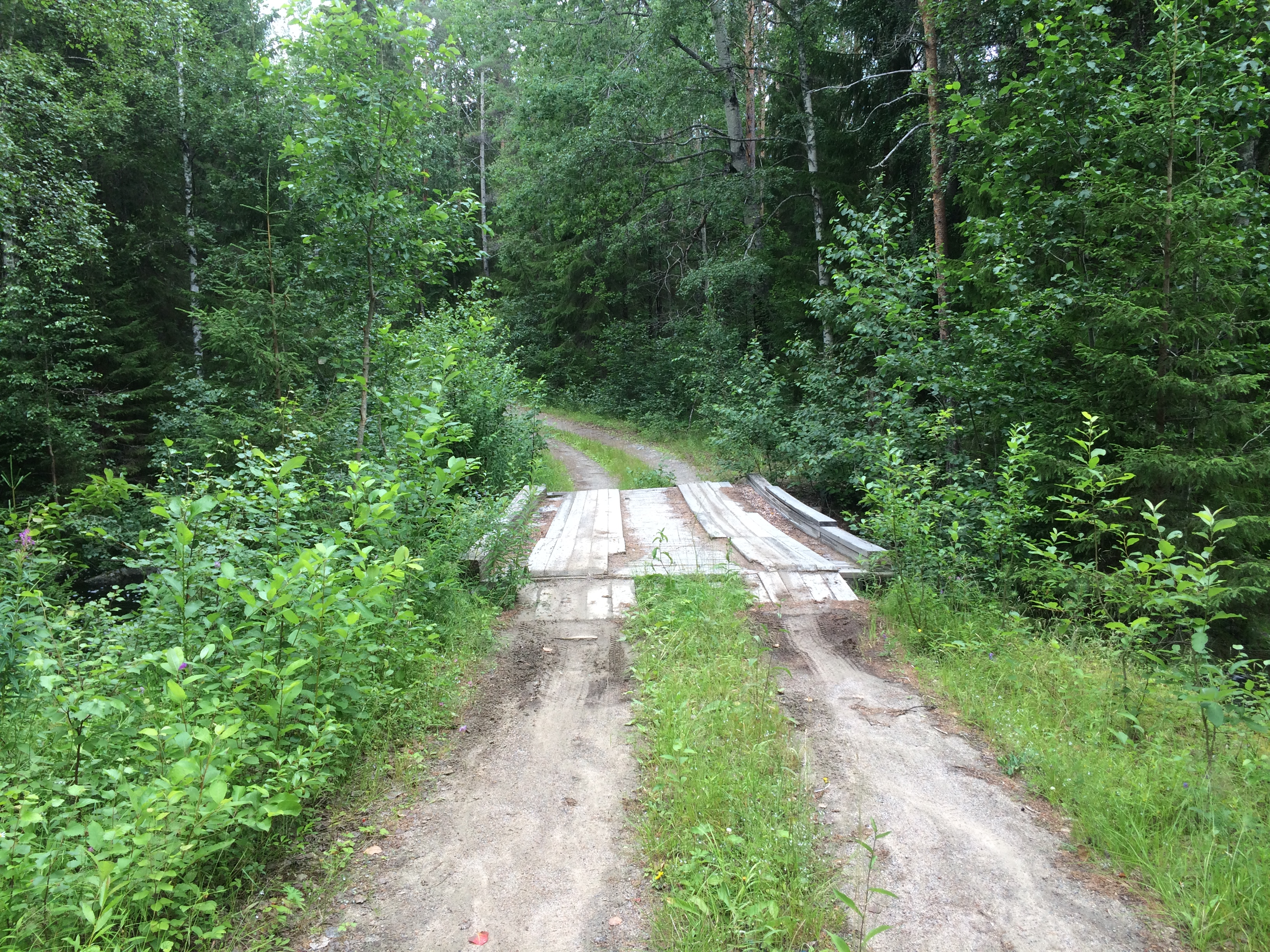 Пейтанйоки